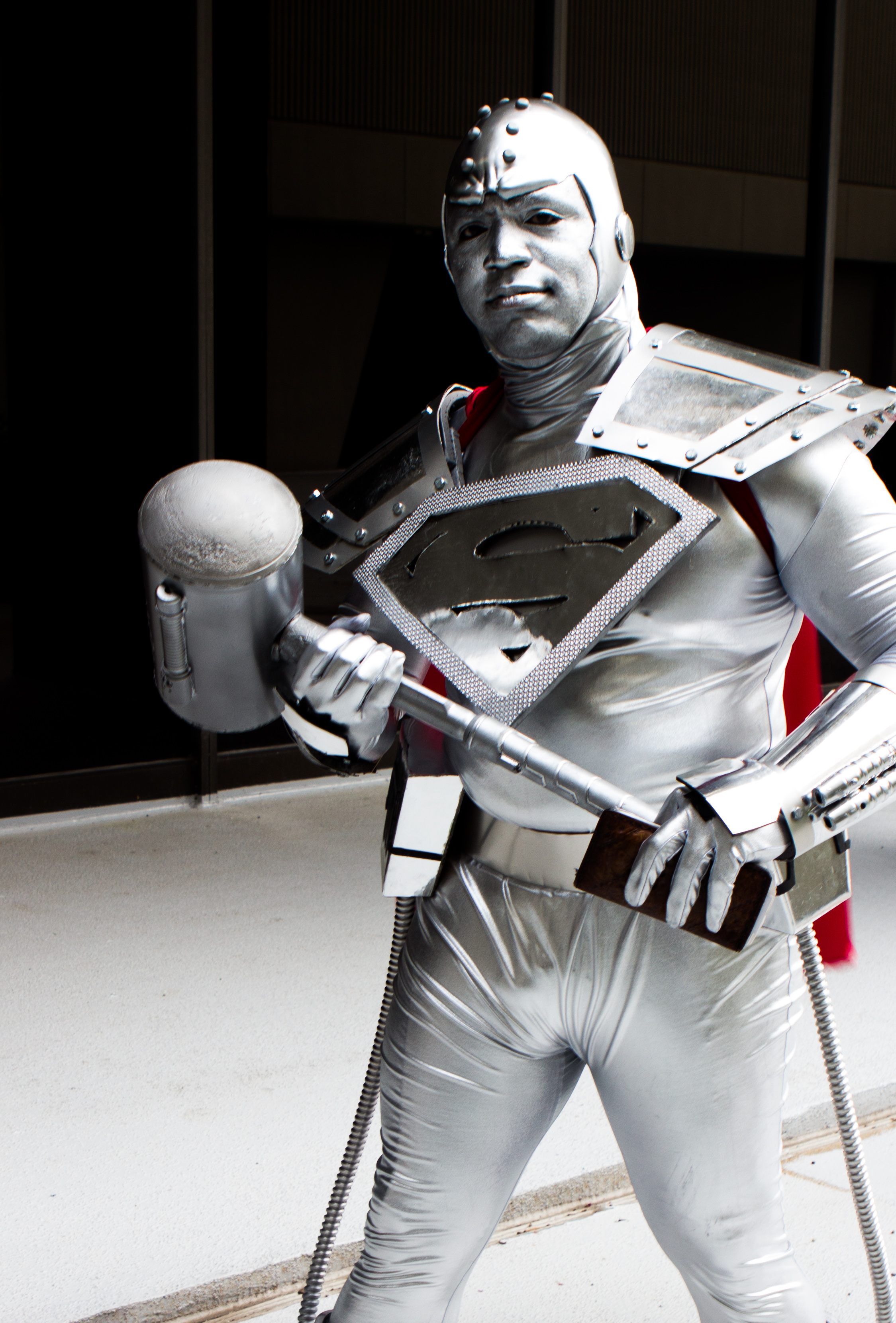 Cosplay at Dragon*Con 2013.